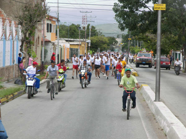 Caminata de Bejuma.